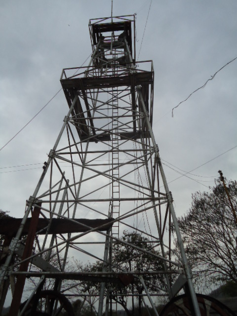 Réplica de equipo de perforación de Camiri No. 1 This medium shows the protected monument with the number S/00-050 in Bolivia.